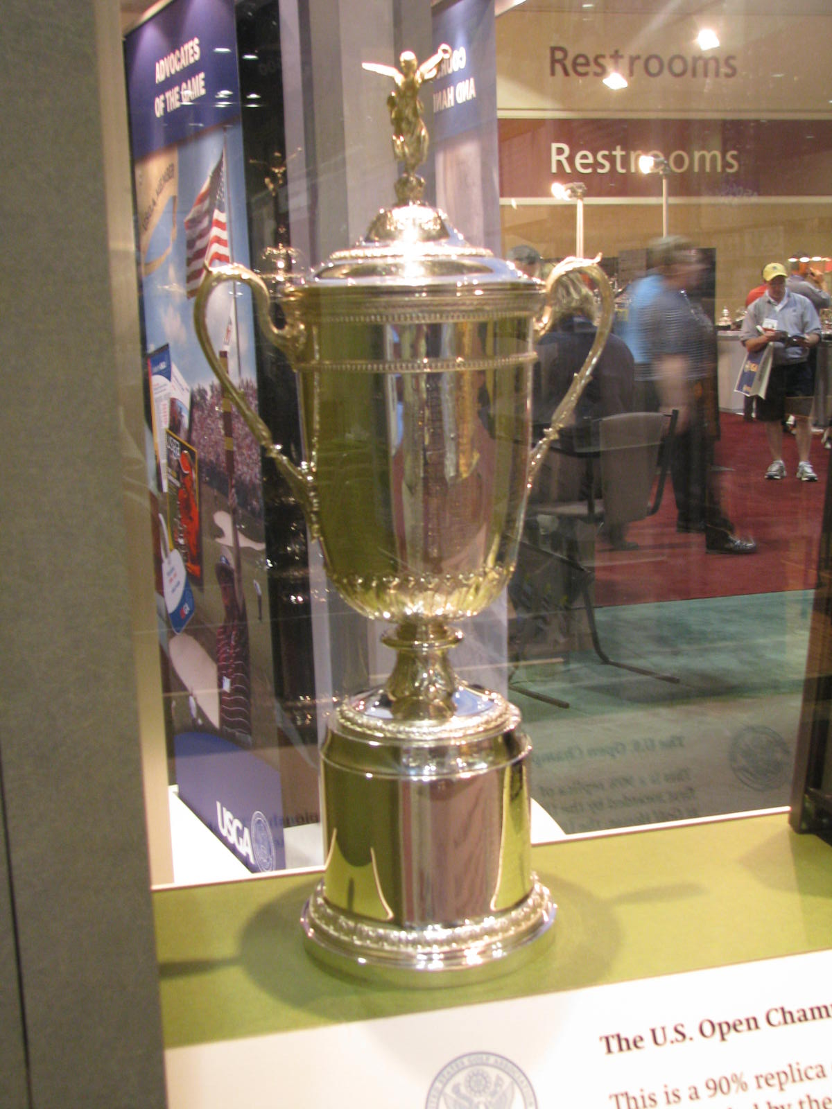 2008年展出的美国公开赛奖杯. This is a picture of the USGA Trophy for the U.S. Open called the U.S. Open Trophy.